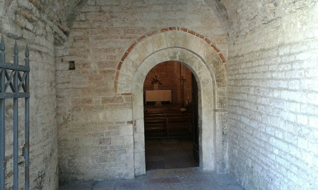 Entrata dell'abbazia di San Vittore alle Chiuse. Fotografia scattata da me il 17 aprile 2017.